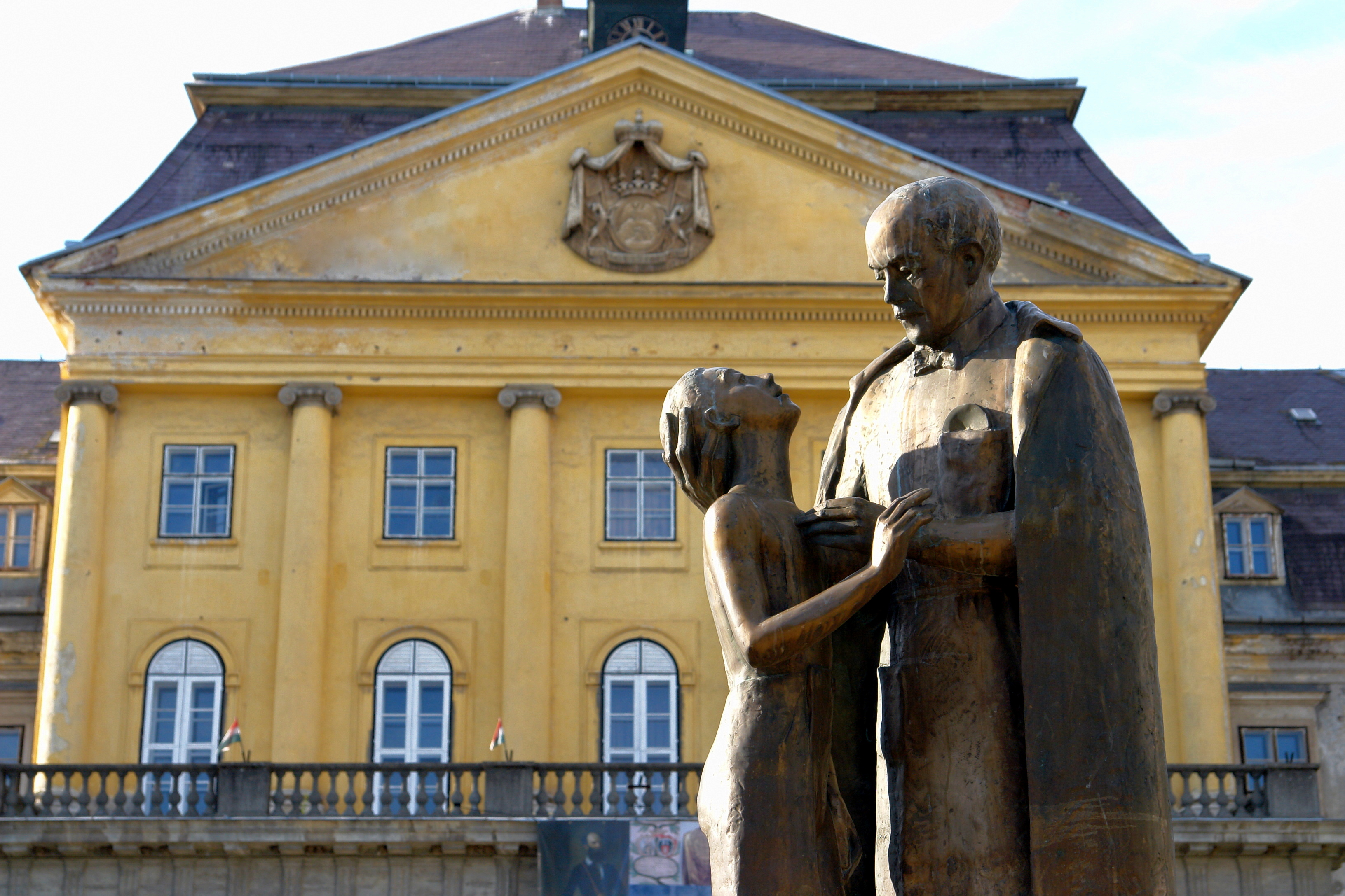 Dr. Batthyány-Strattmann László szobra (Lesenyei Márta, bronz, 1990) két alakos szobor, a felesége a másik alak. A talapzaton lévő domborművek családi körben és szentmisén ábrázolják Batthyány doktort. [1] a körmendi kastély udvarában